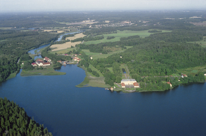 Sturefors slott. Sturefors naturreservat snett uppe till höger i bild. Bilden är tagen mot (väderstreck): V Motiv: Sturefors Nyckelord: Byggnadsminnen, Flygbilder, Naturreservat, Riksintressen Kategori: Herrgårds-/slottslandskap Sturefors slott. Sturefors naturreservat snett uppe till höger i bild. Bilden är tagen mot (väderstreck): V.